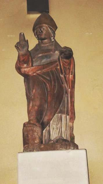 Statue de Saint Epvre dans l'église de Contrexeville (choeur gauche)